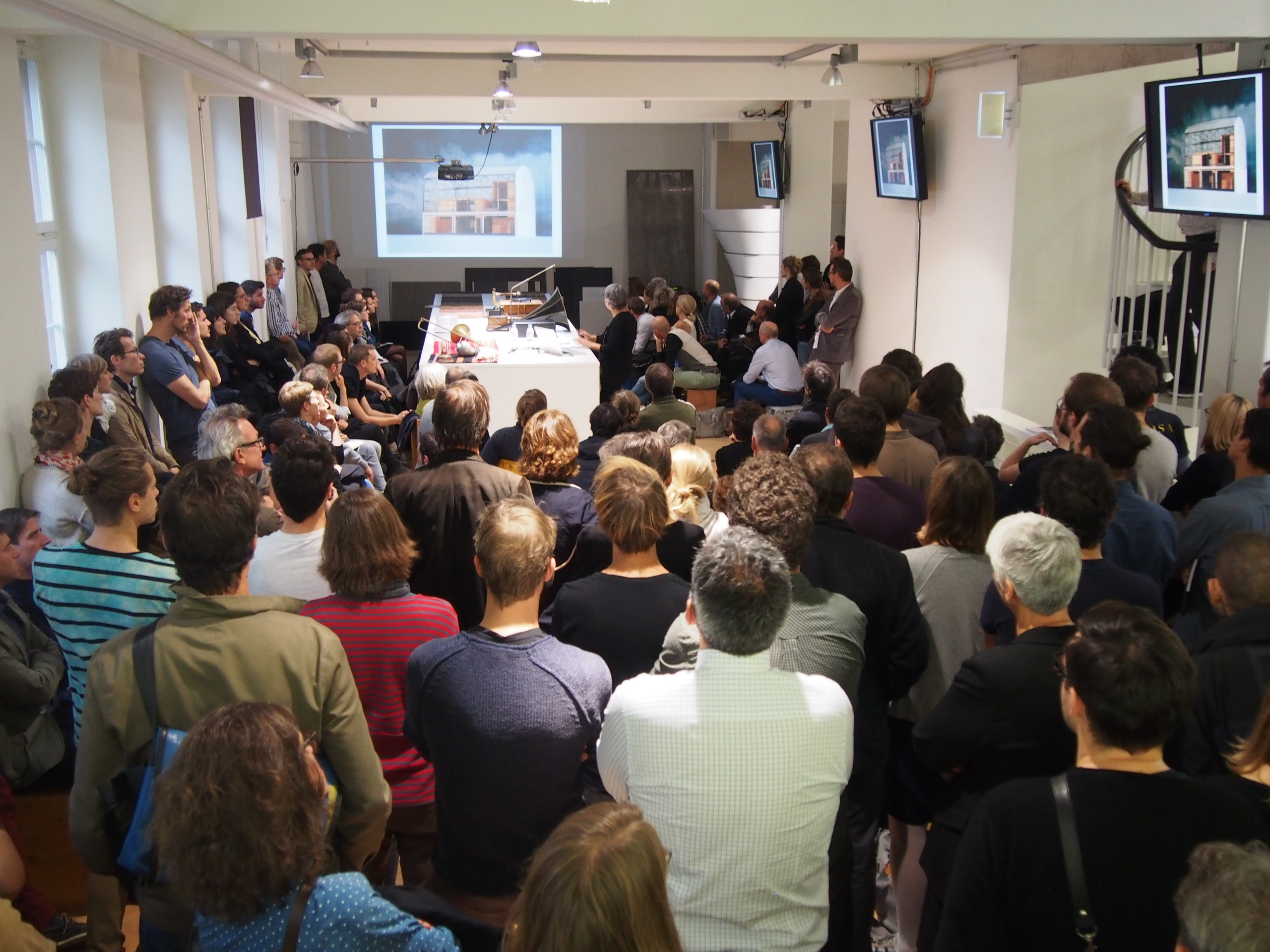 SBCZ_Veranstaltung